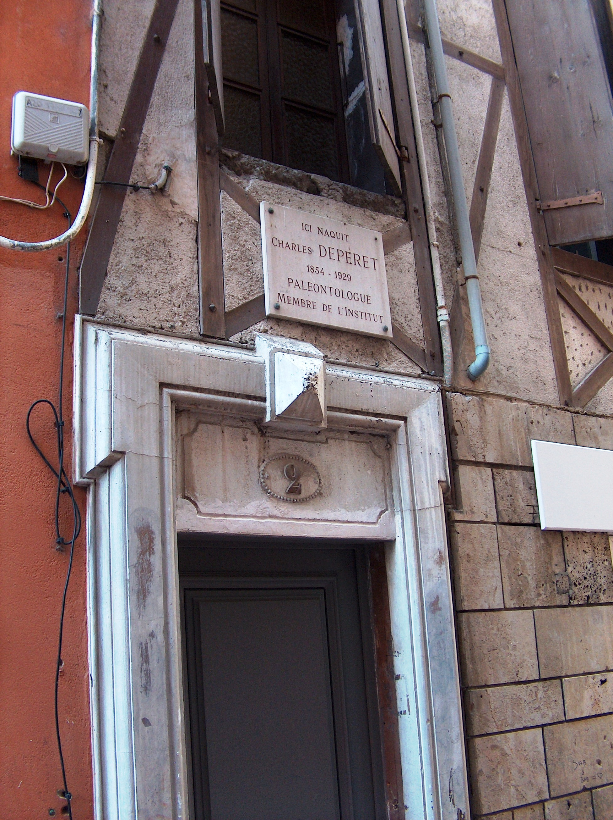 Quartier Saint-Jean. Plaque indiquant la naissance au 2 de la rue de Charles Depéret, paléontologue.